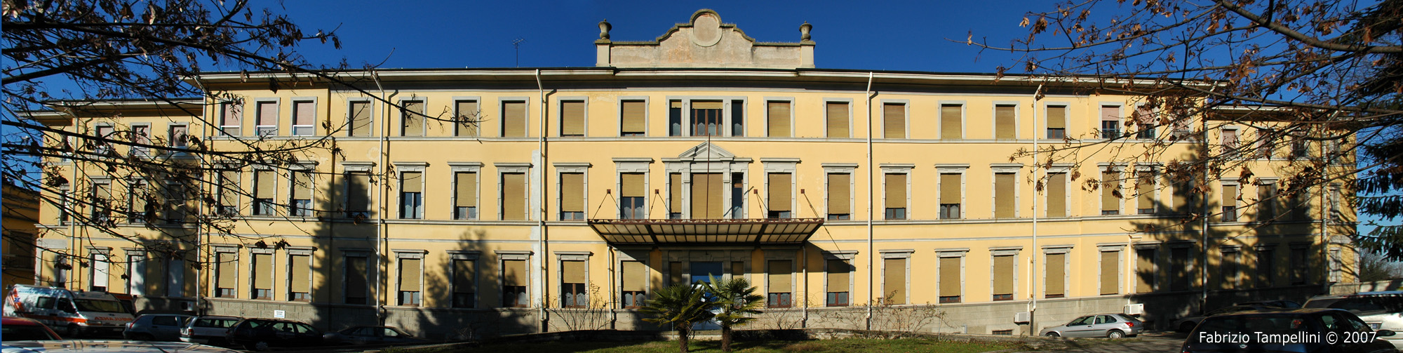 Ospedale Vecchio